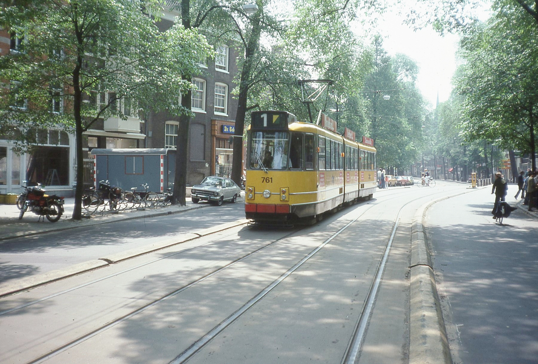 Photo. Trams aux Fils. Prise en juin 1976 Ligne 1 à Nieuwezijds Voorburgwal Tram 761